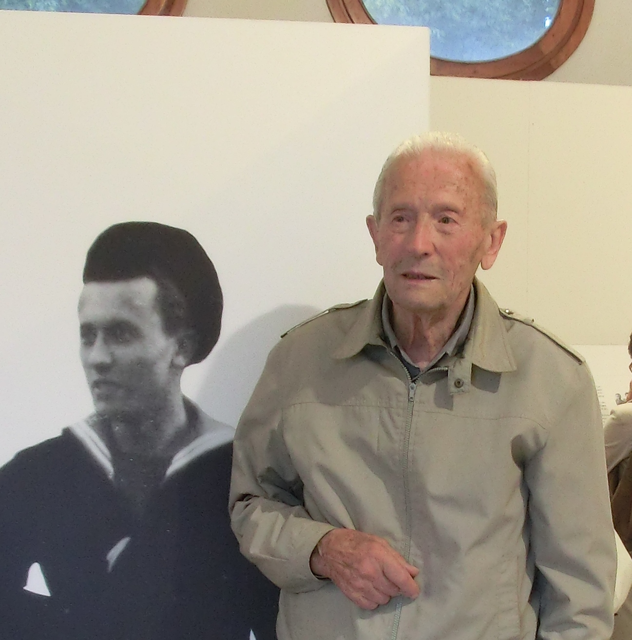 Foto Luigi Baldan (31.5.2014)